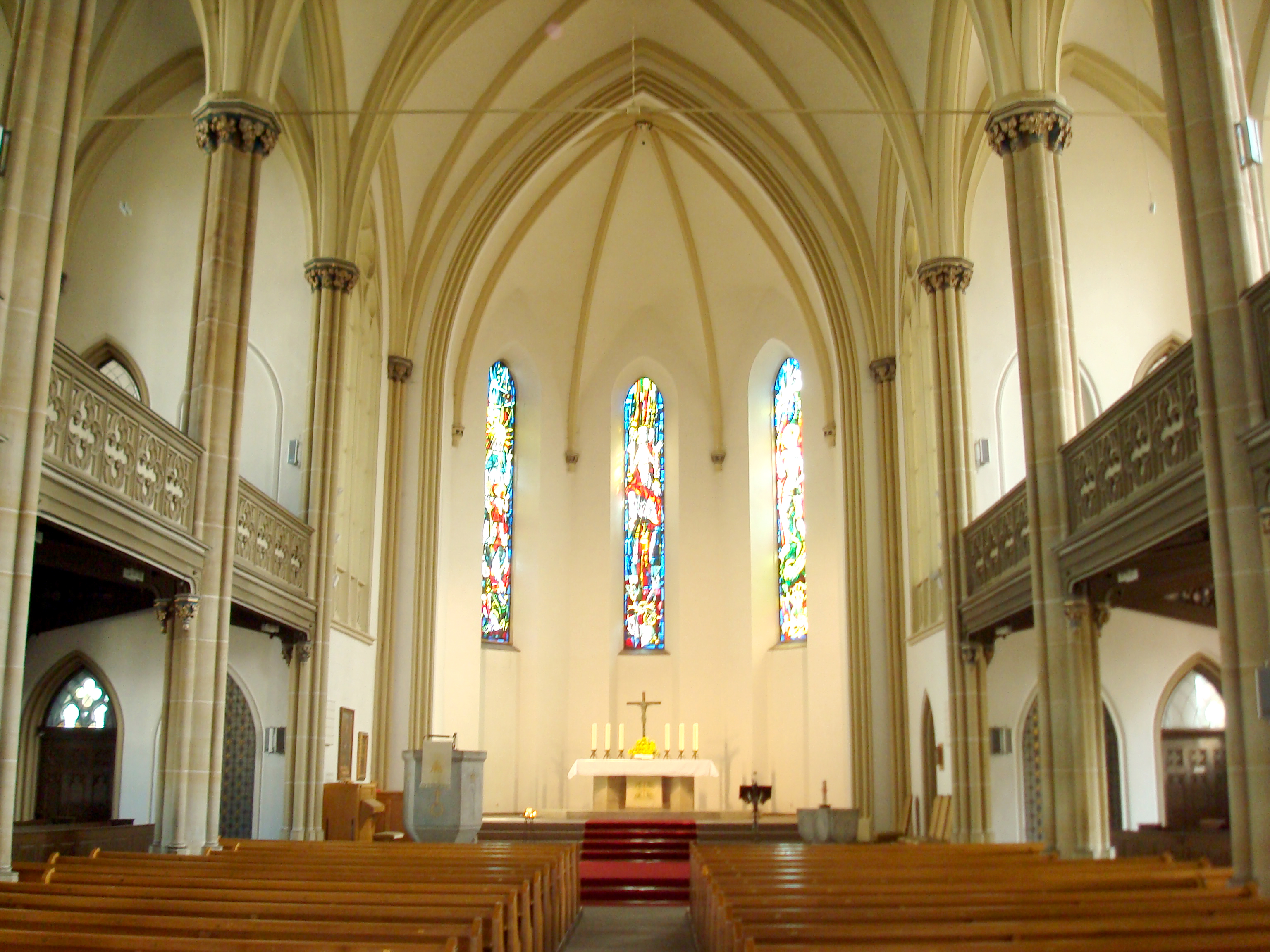 Martin-Luther-Kirche, Gütersloh This is a photograph of an architectural monument. 031